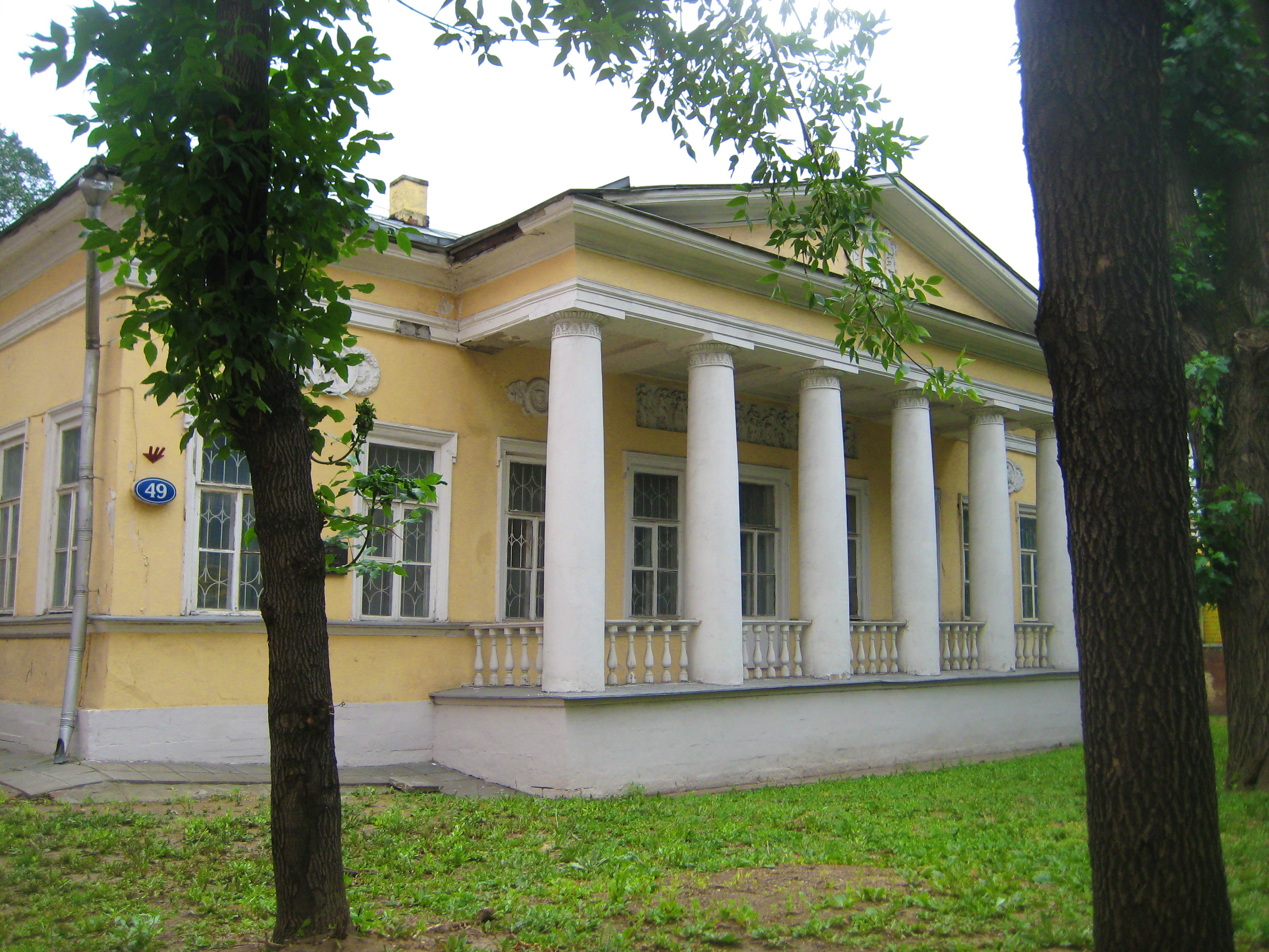 Остоженка. № 49, дом А. В. Всеволожского.